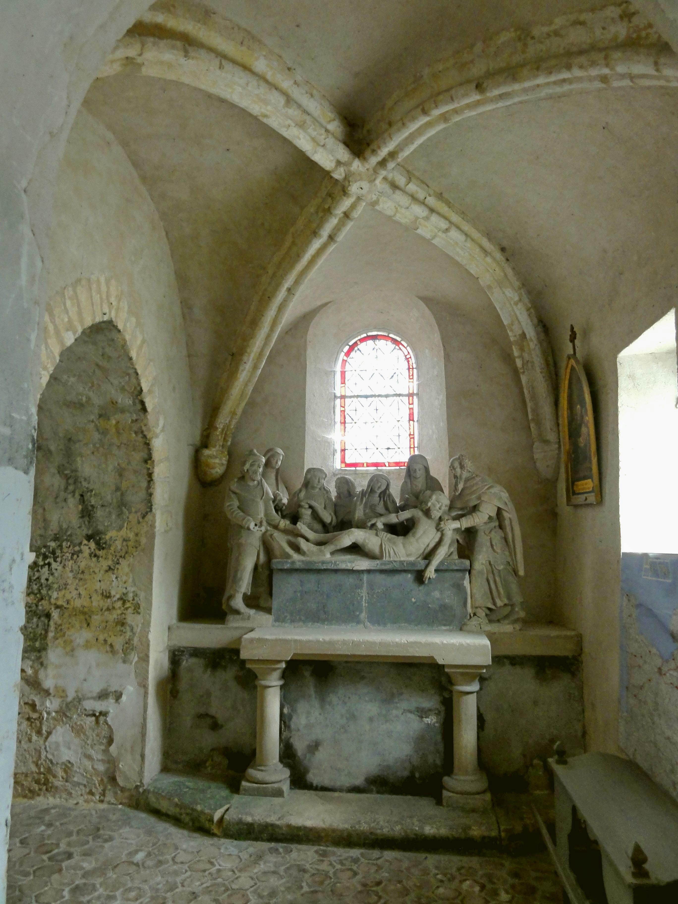 Première travée du bas-côté nord, vue vers l'ouesT.